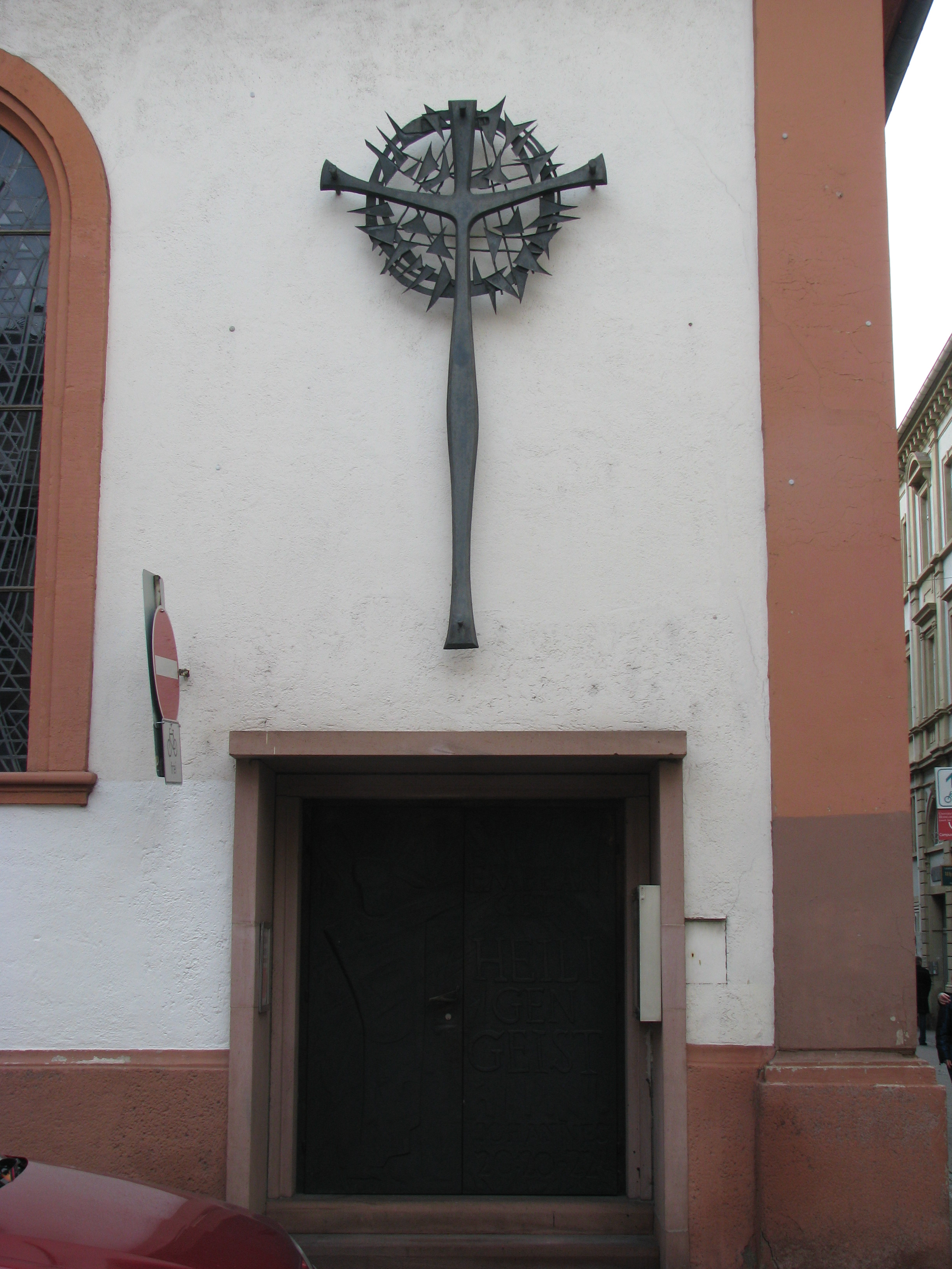 Eingang der Erlöserkirche in der Heidelberger Altstadt mit Bronzeportal und Bronzekreuz von Harry MacLean